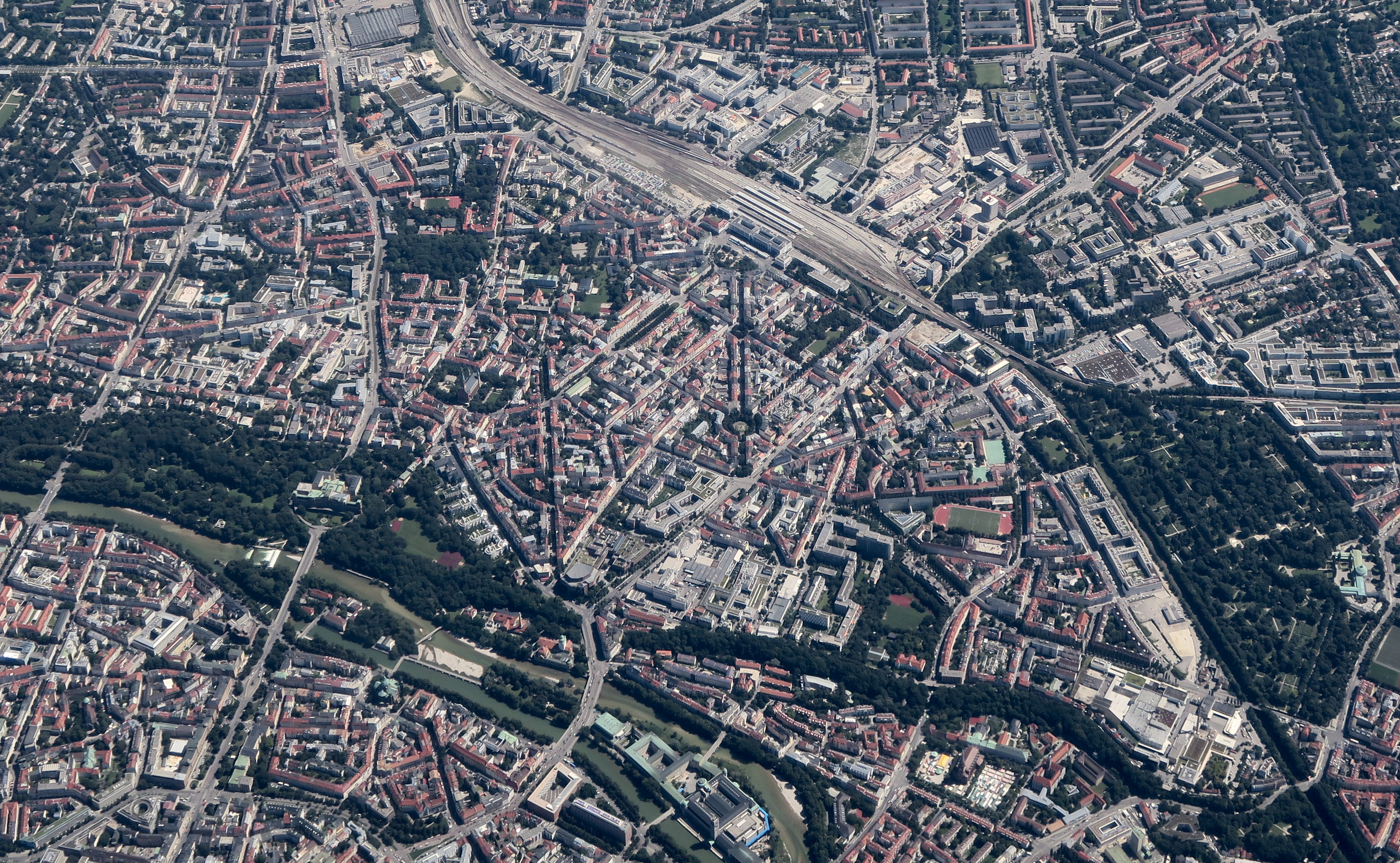 Luftbild des Stadtteils Haidhausen in München